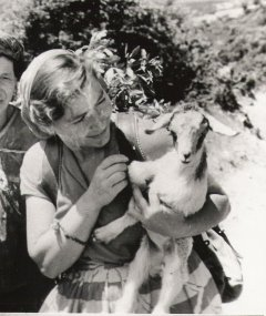 Simone Tanner-Chaumet (rechts im Bild) in Kabylie 1953